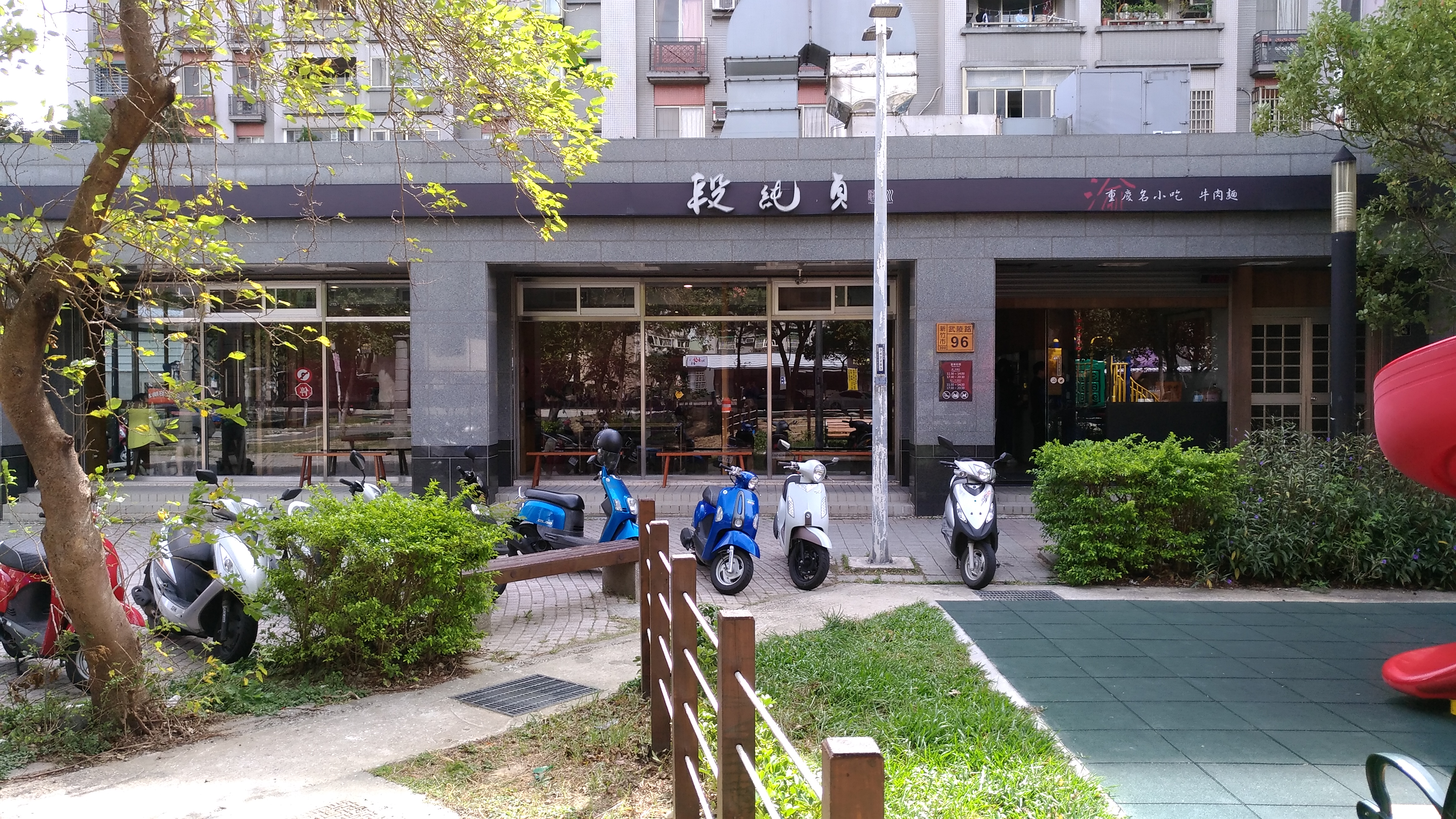 段純貞牛肉麵創始店武陵店新店址